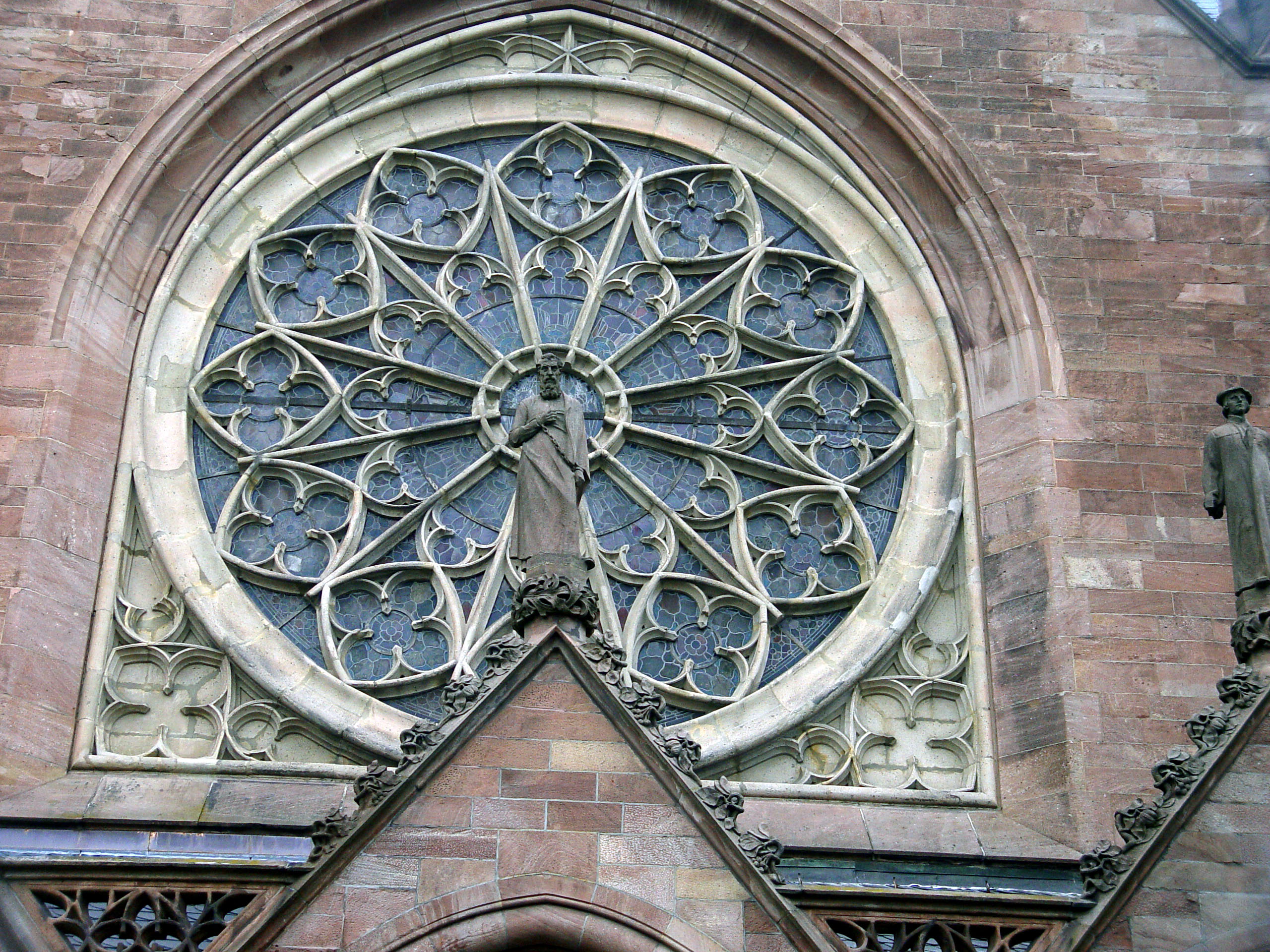 Gemeinfrei, fotographiert von Martin Dürrschnabel Motiv: Rosette der Christuskirche Karlsruhe :Kategorie:Karlsruhe